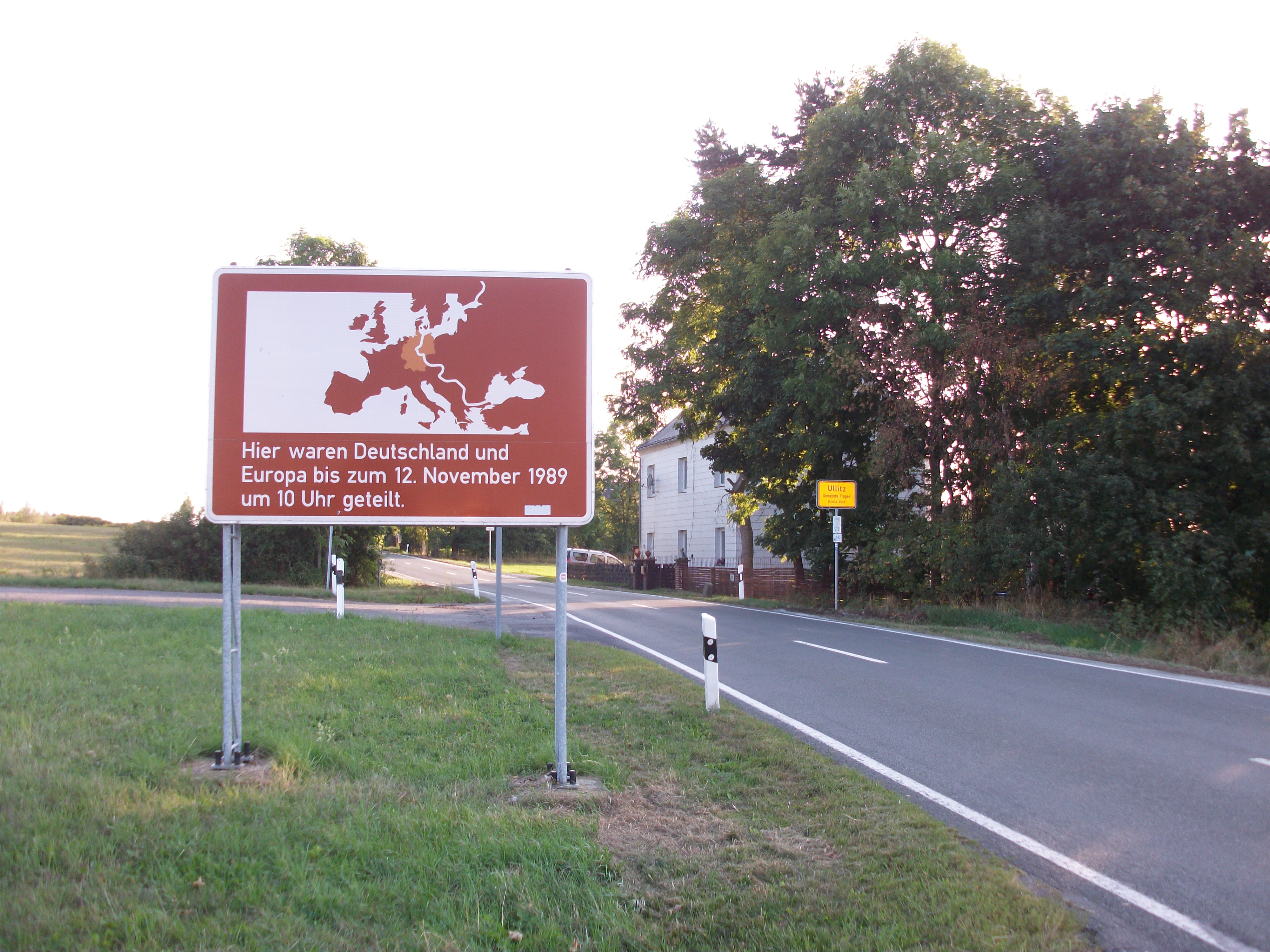 Ullitz, bayerisch–sächsische Landesgrenze an der ehemaligen B 173